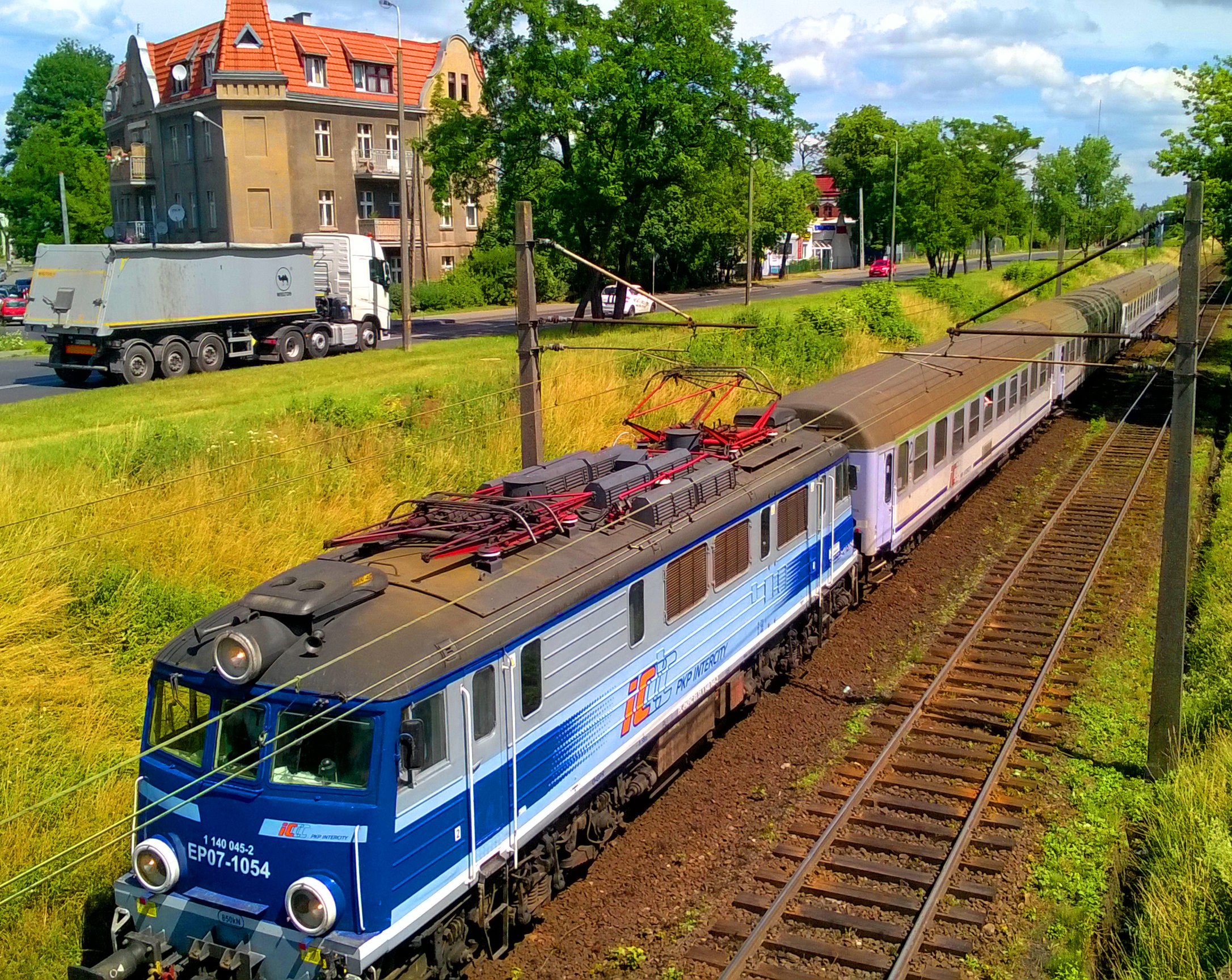 Linia kolejowa numer 353 w Toruniu